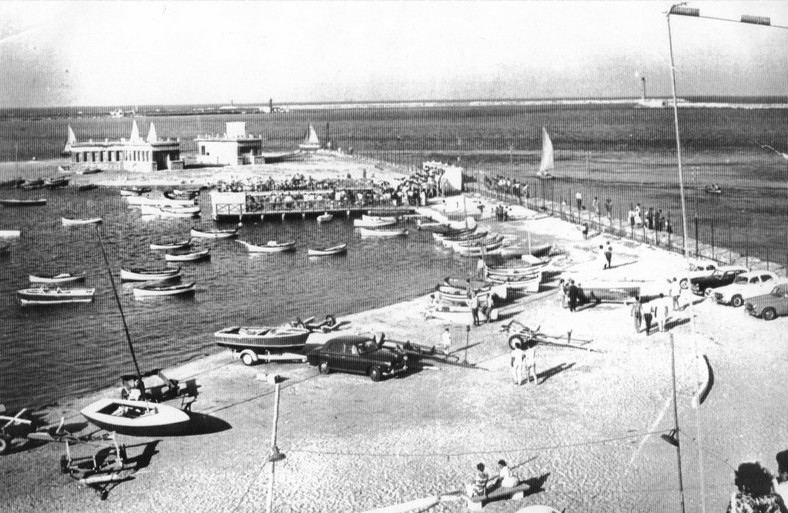 Photo du Sport Nautique Bizertin (années 1956-1964).